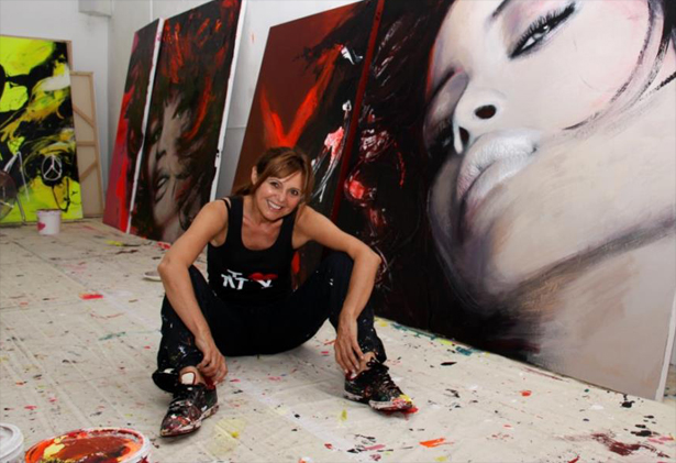 Joanne Corno allias Corno, Peintre québécoise.